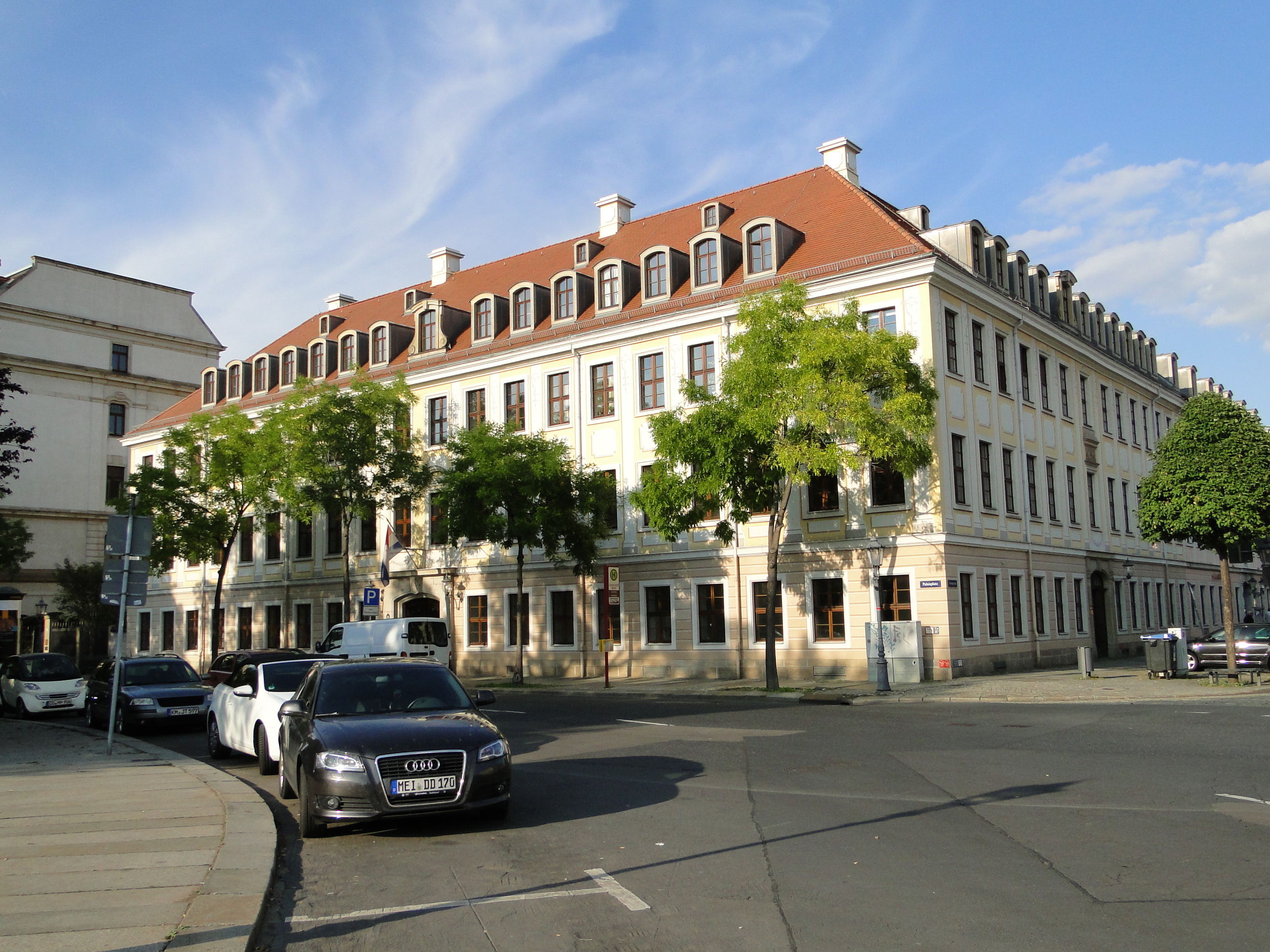 Kulturdenkmal Palaisplatz 3 Dresden, Sitz Honorarkonsulat Niederlande